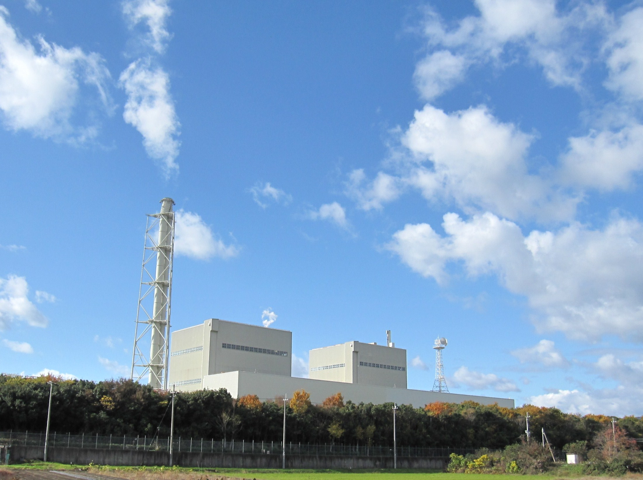 関西電力赤穂発電所